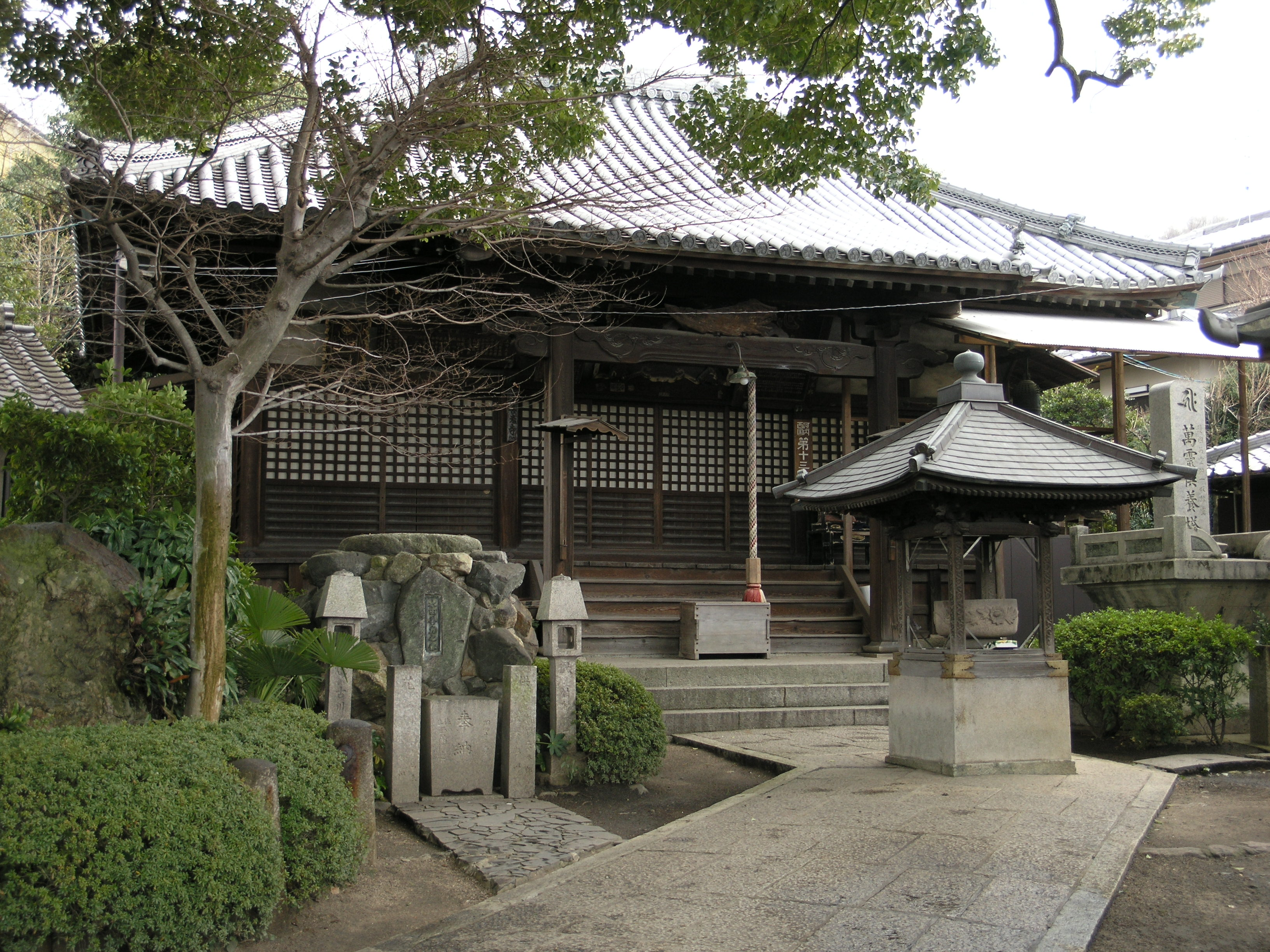 Zenkōji in Yao, Osaka, Japan